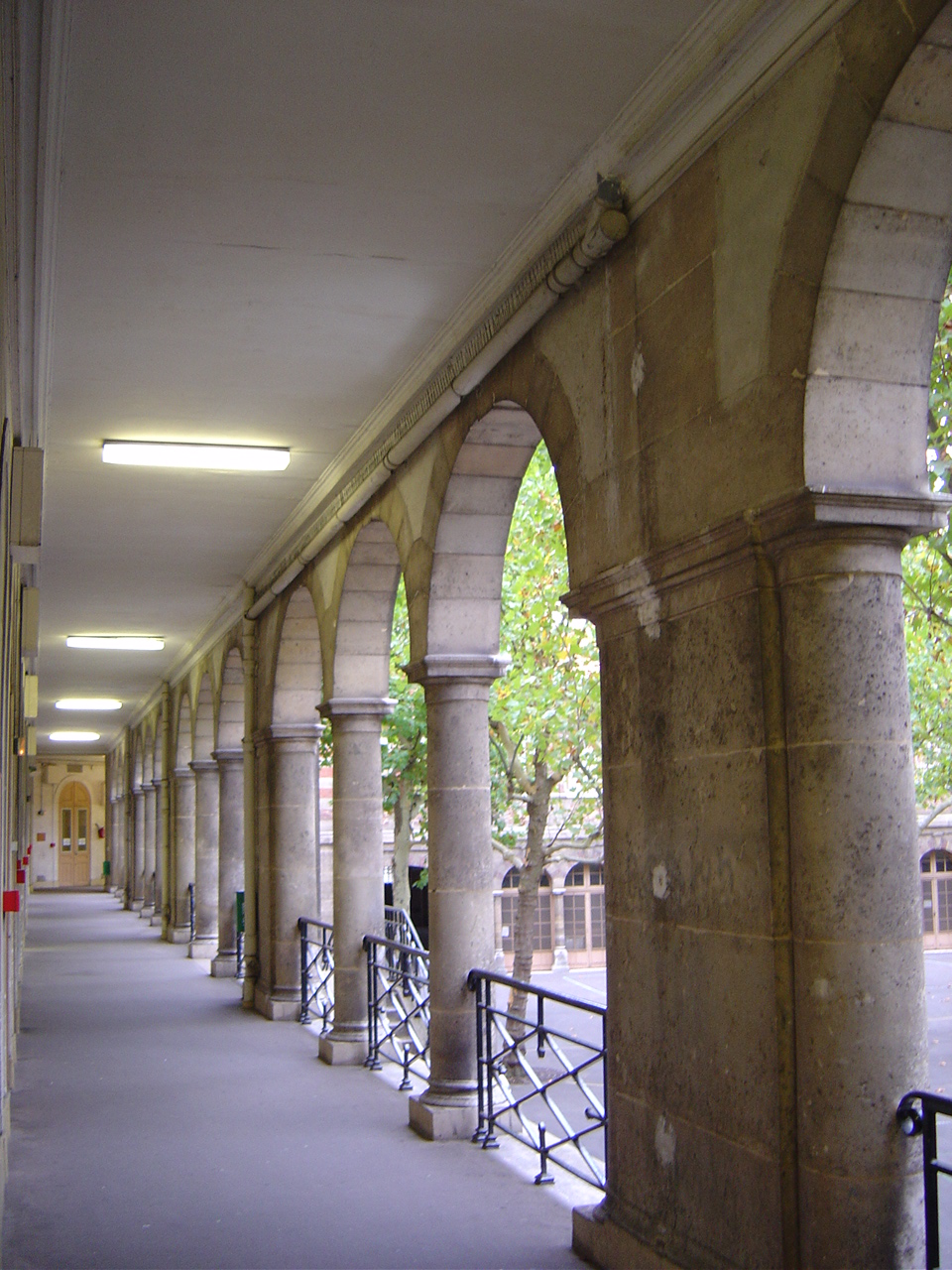 Galerie inférieure du lycée Arago.